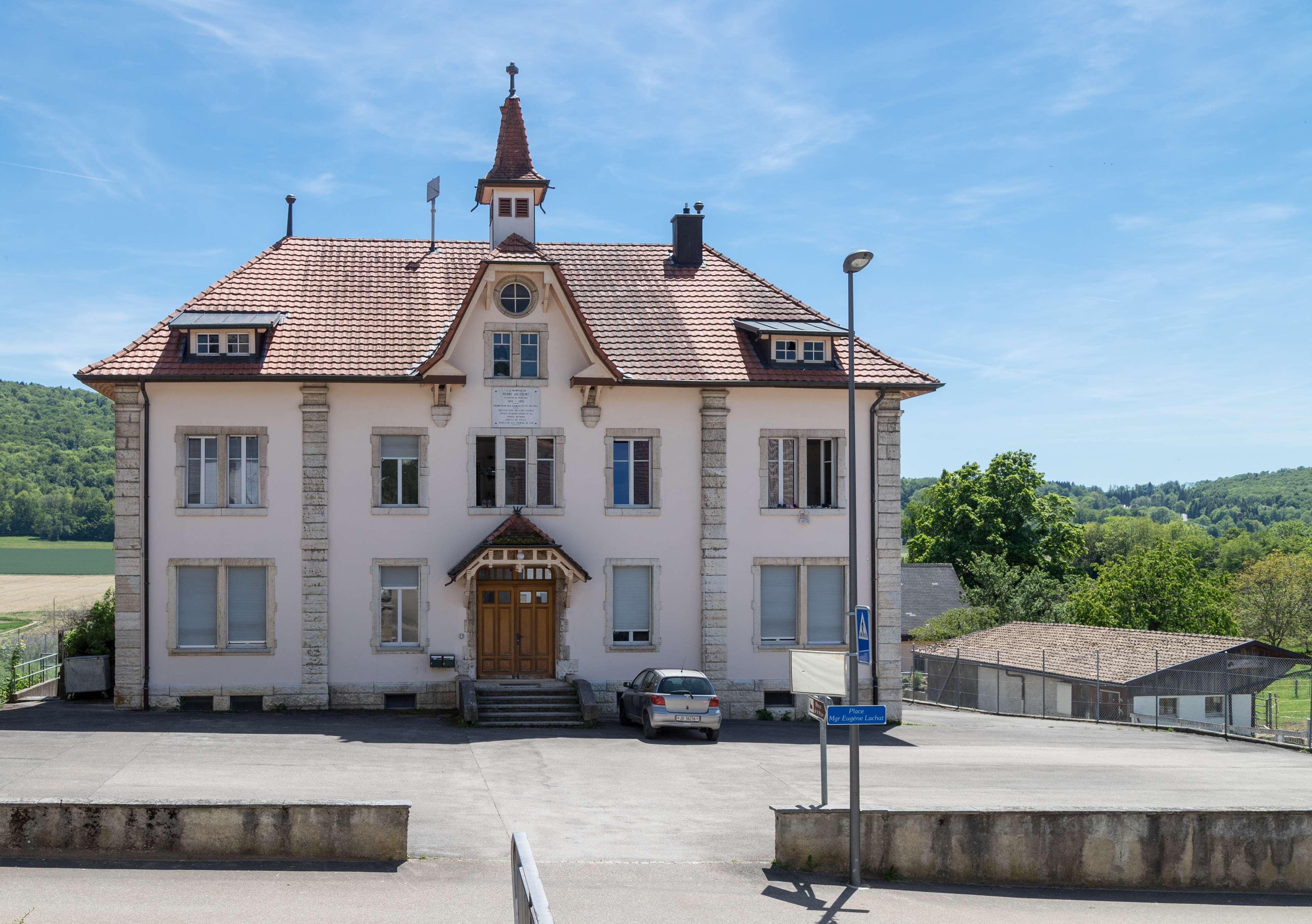 Réclère, Place Mgr Eugène Lachat. "A la memoire de Pierre Jolissaint...."